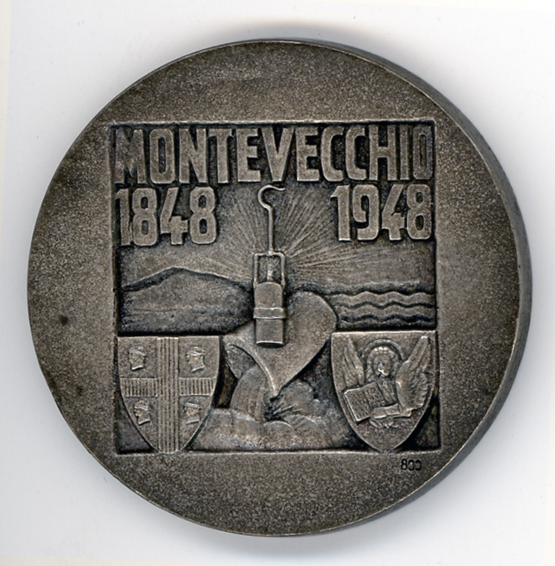 Médaille inogurant le centenaire des mines de montevecchio en sardaigne, donné au mineurs de cette mines. Je suis l'auteur de l'image. (médaille de mon grand père)